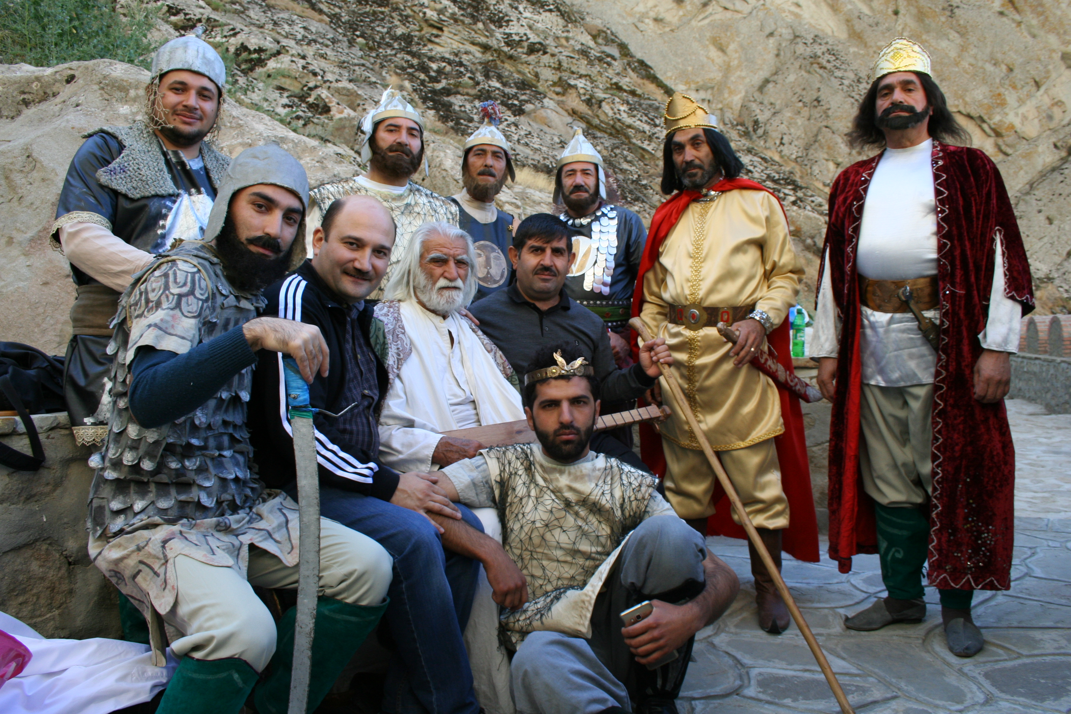 Dədə orqud və Naxçıvan Sənədli filminin çəkilişi (1)